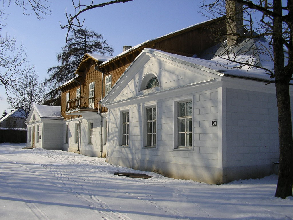 Aruküla mõisa härrastemaja